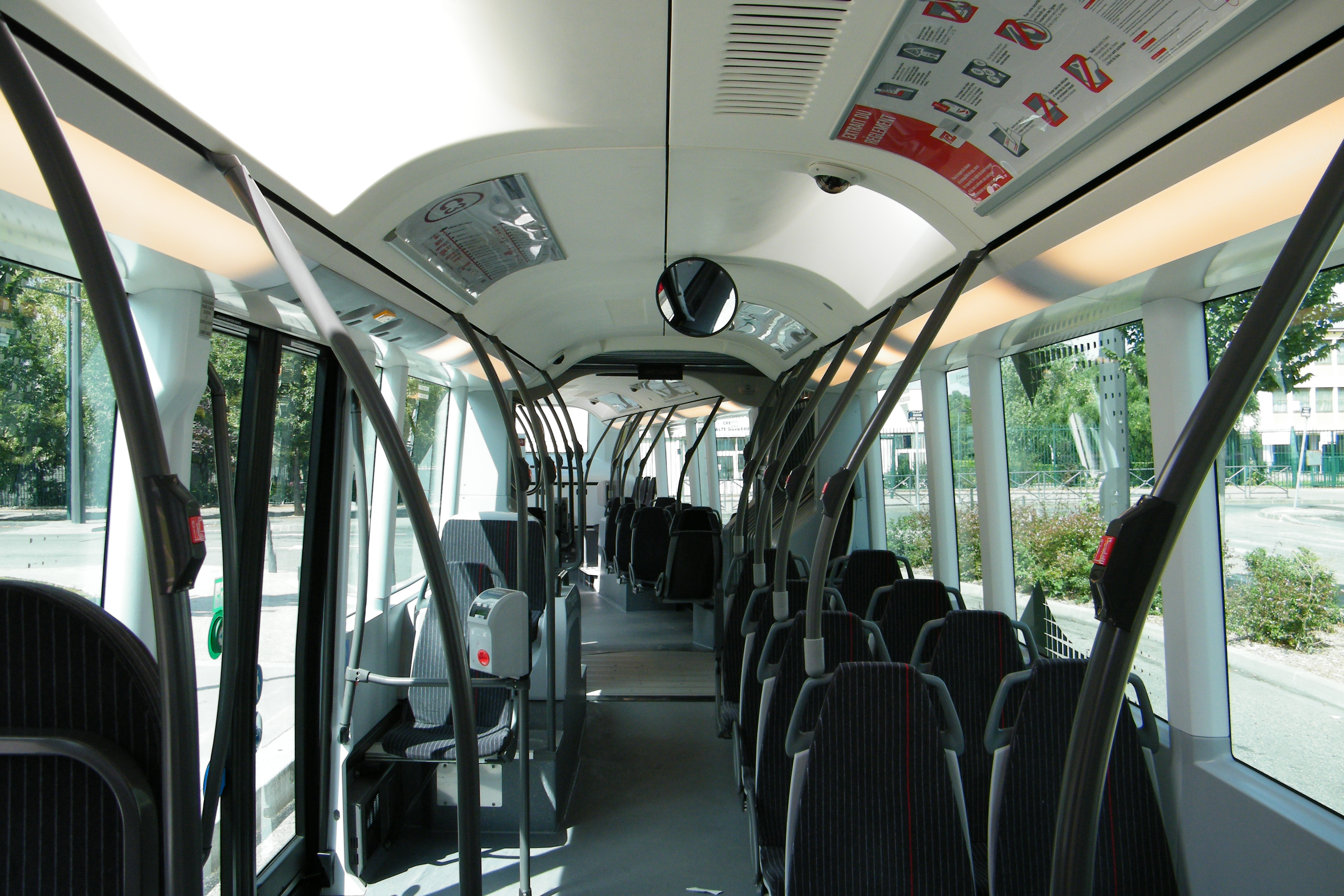 Intérieur d'un trolleybus Irisbus Cristalis ETB18 du réseau TCL livré en 2010.(Différence visibles par rapport aux véhicules livrés antérieurement: les globes des caméras de surveillance, et la disposition de certaines barres de maintien)